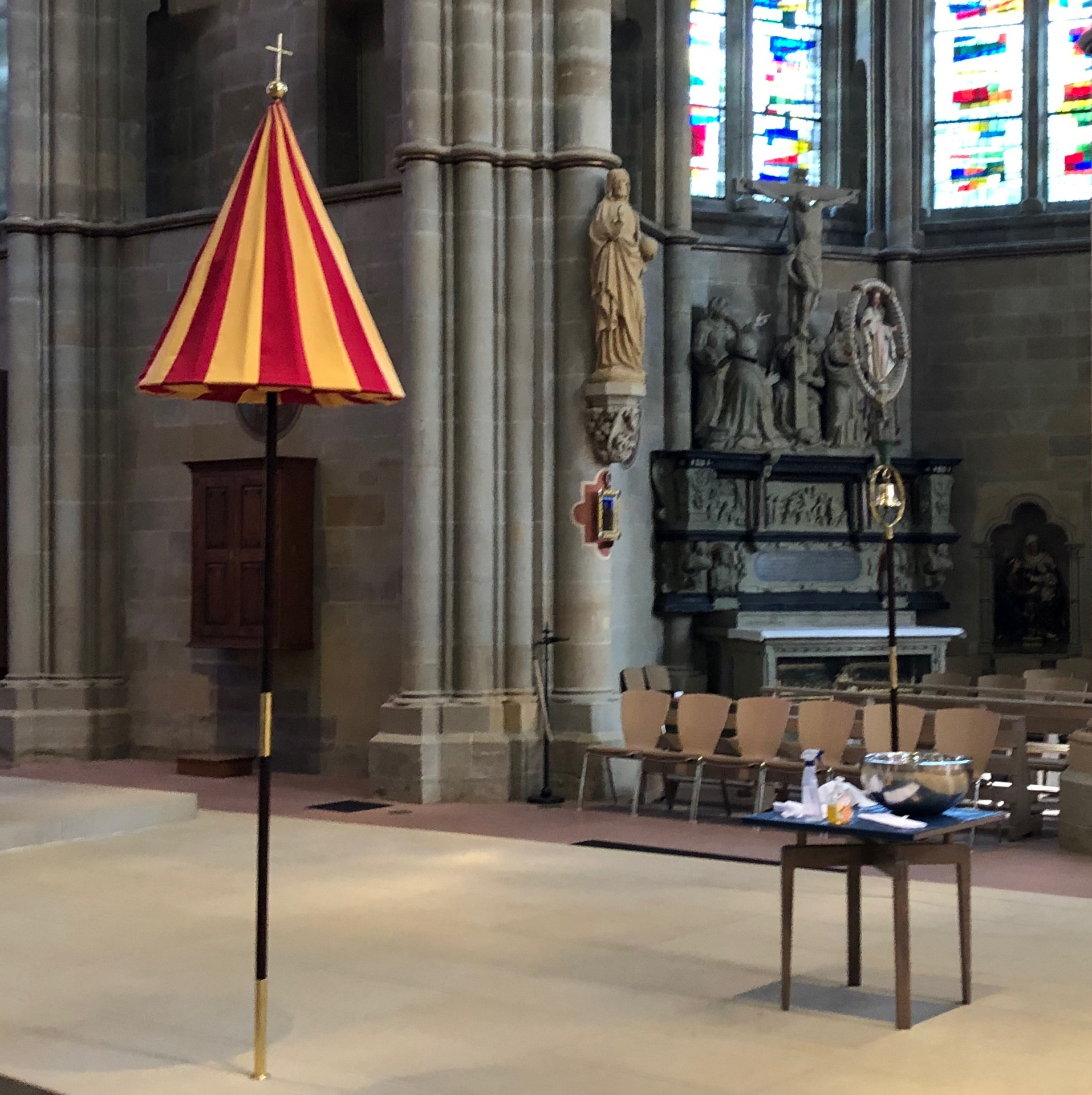 Insignien der Liebfrauenkirche in Trier als Basilika Minor